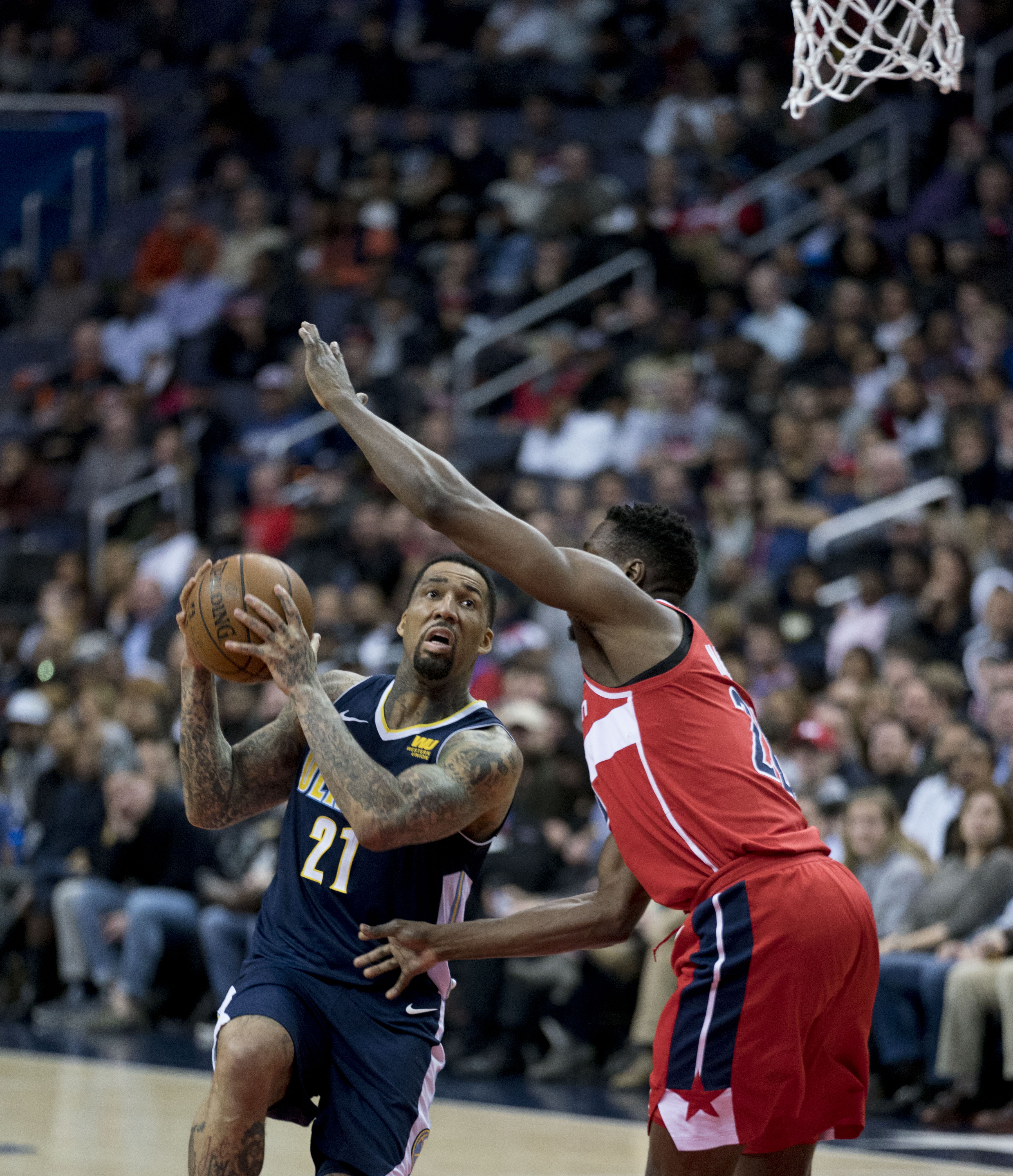 Nuggets at Wizards 3/23/18